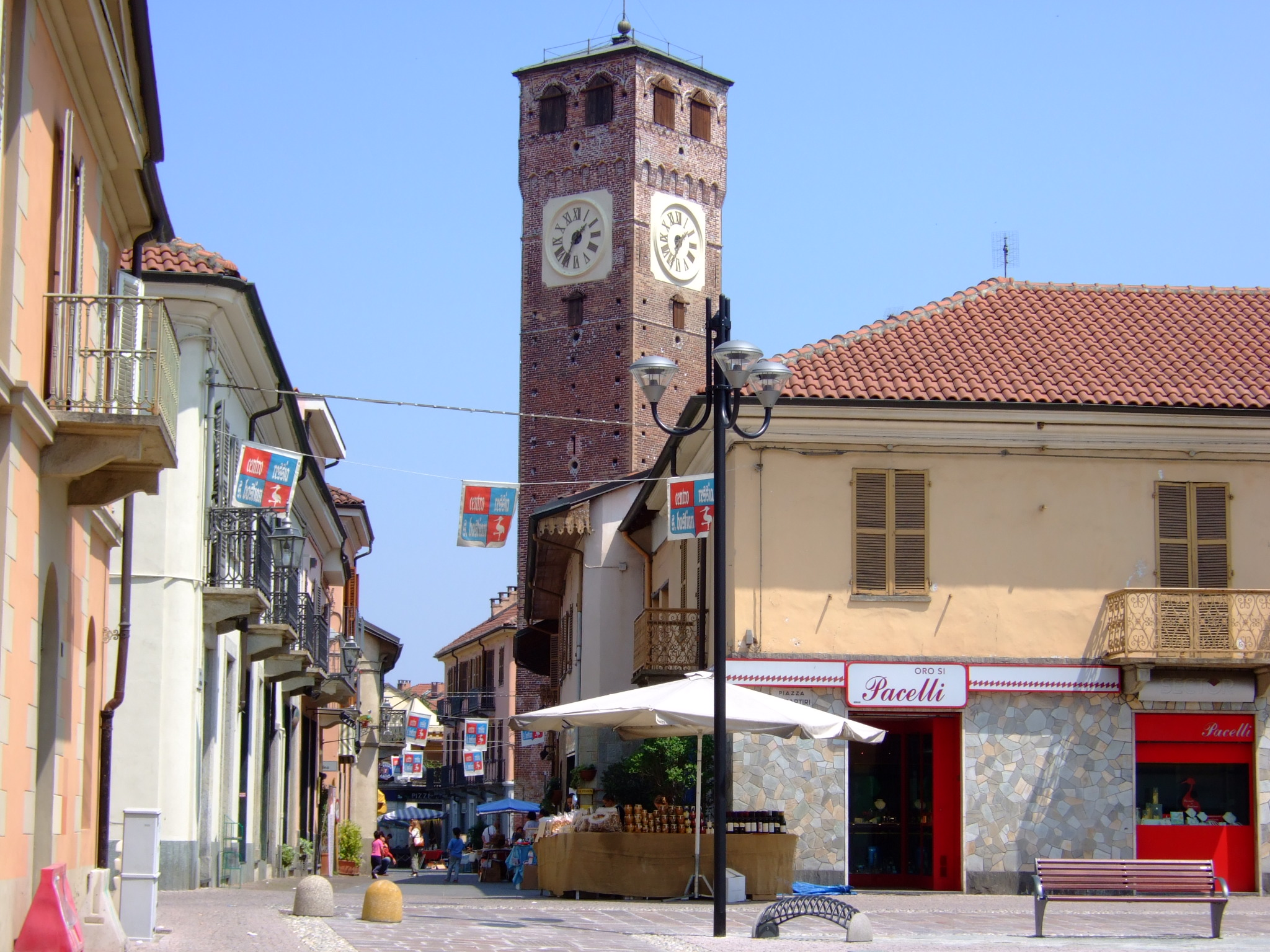 Le centre historique à Grugliasco